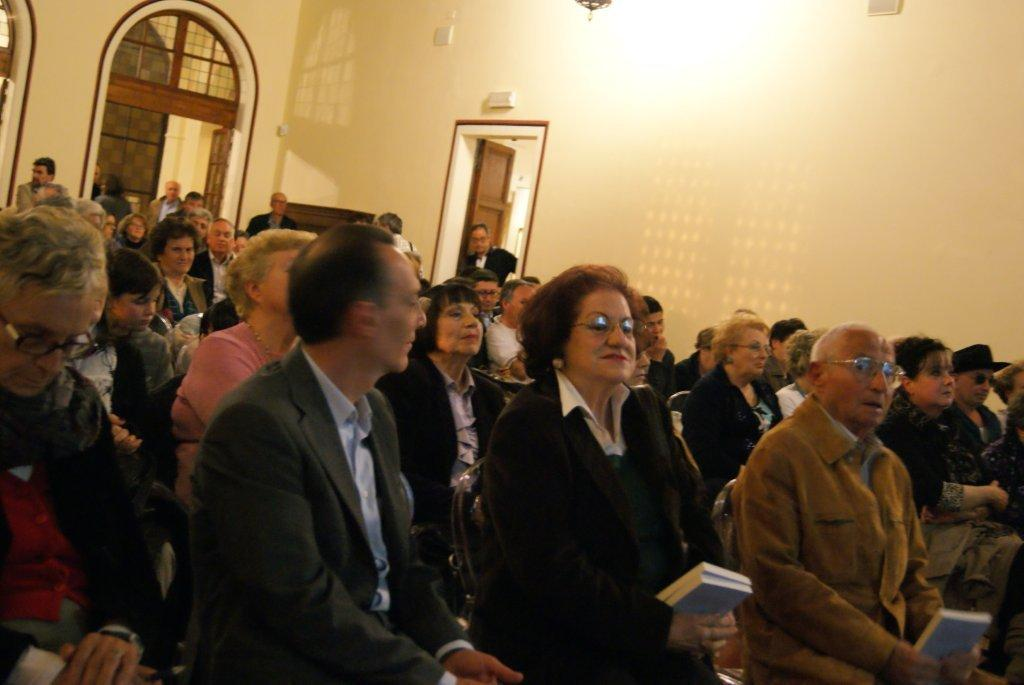 Foto del poeta Giordano De Angelis con la moglie Giuditta Crucianelli